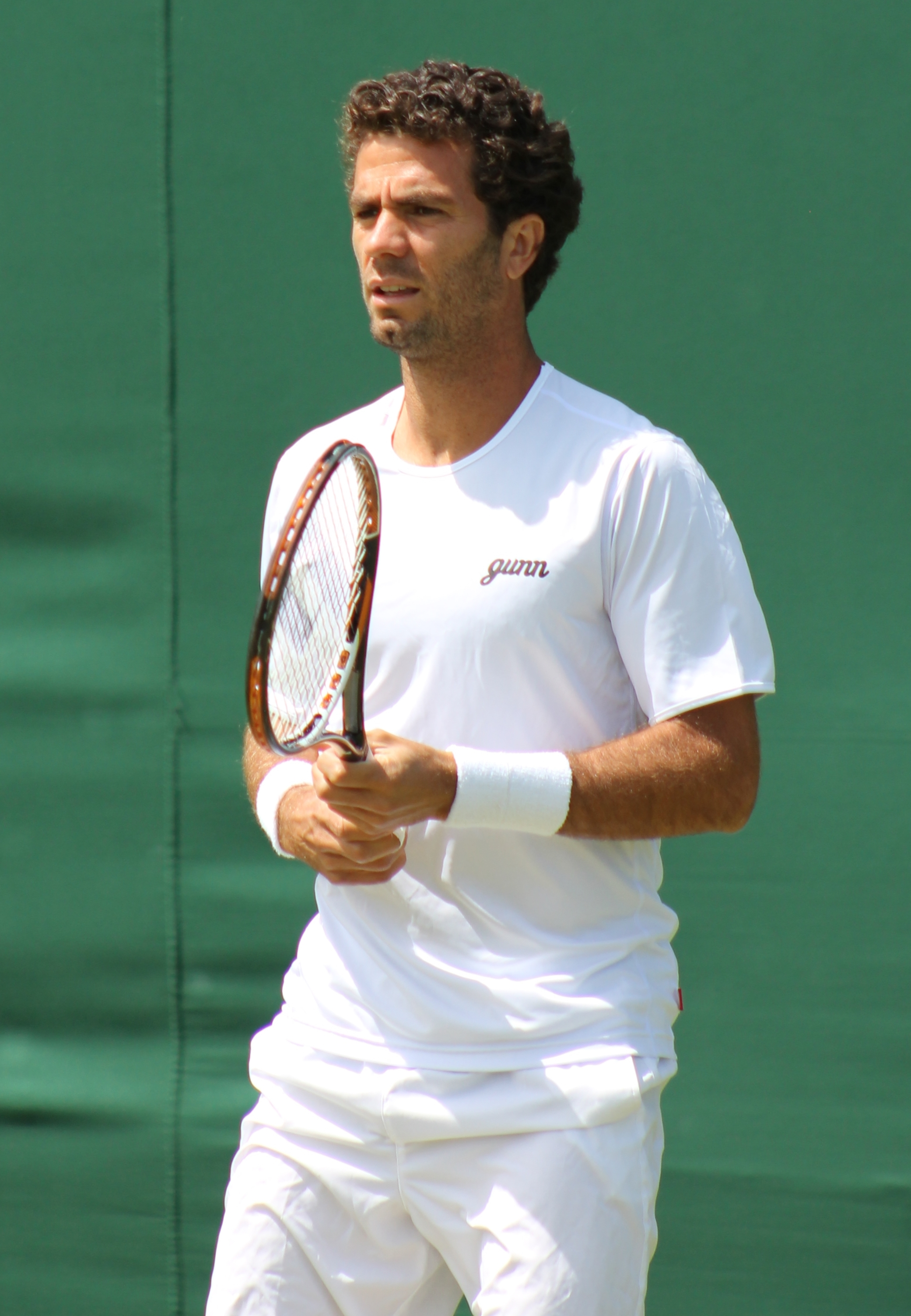 Rojer WM13-003